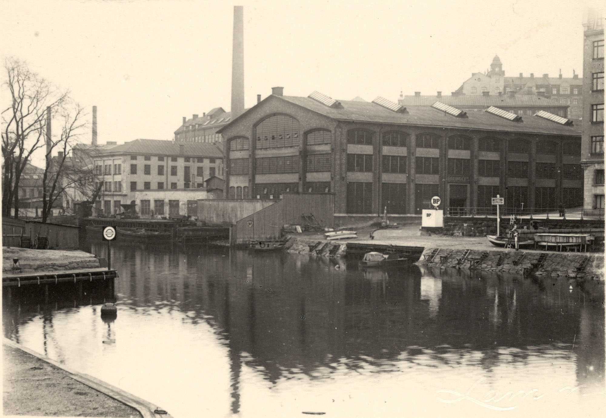 Bolinders verkstäder från norra sidan av Klara sjö, Stockholm, fastigheten Bolinders 8, 1934.